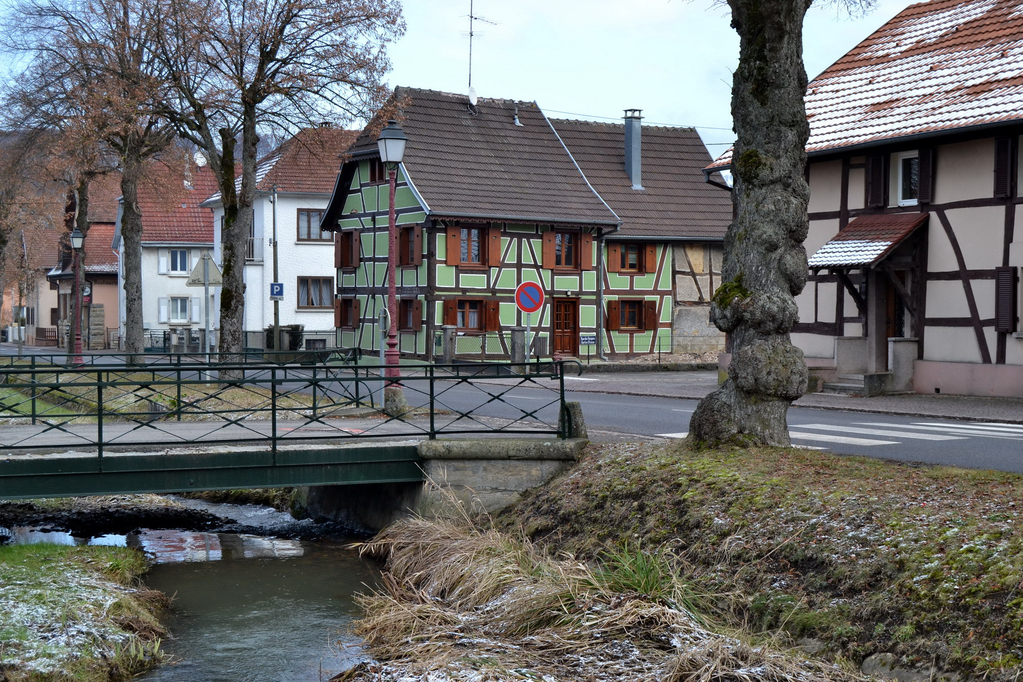 rue Principale à Hirtzbach, Haut-Rhin, Alsace, France.